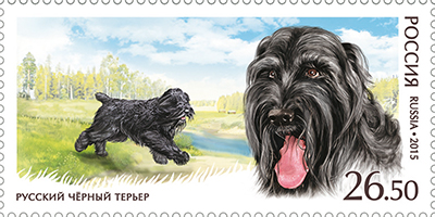 Серия «Фауна России. Служебные породы собак»